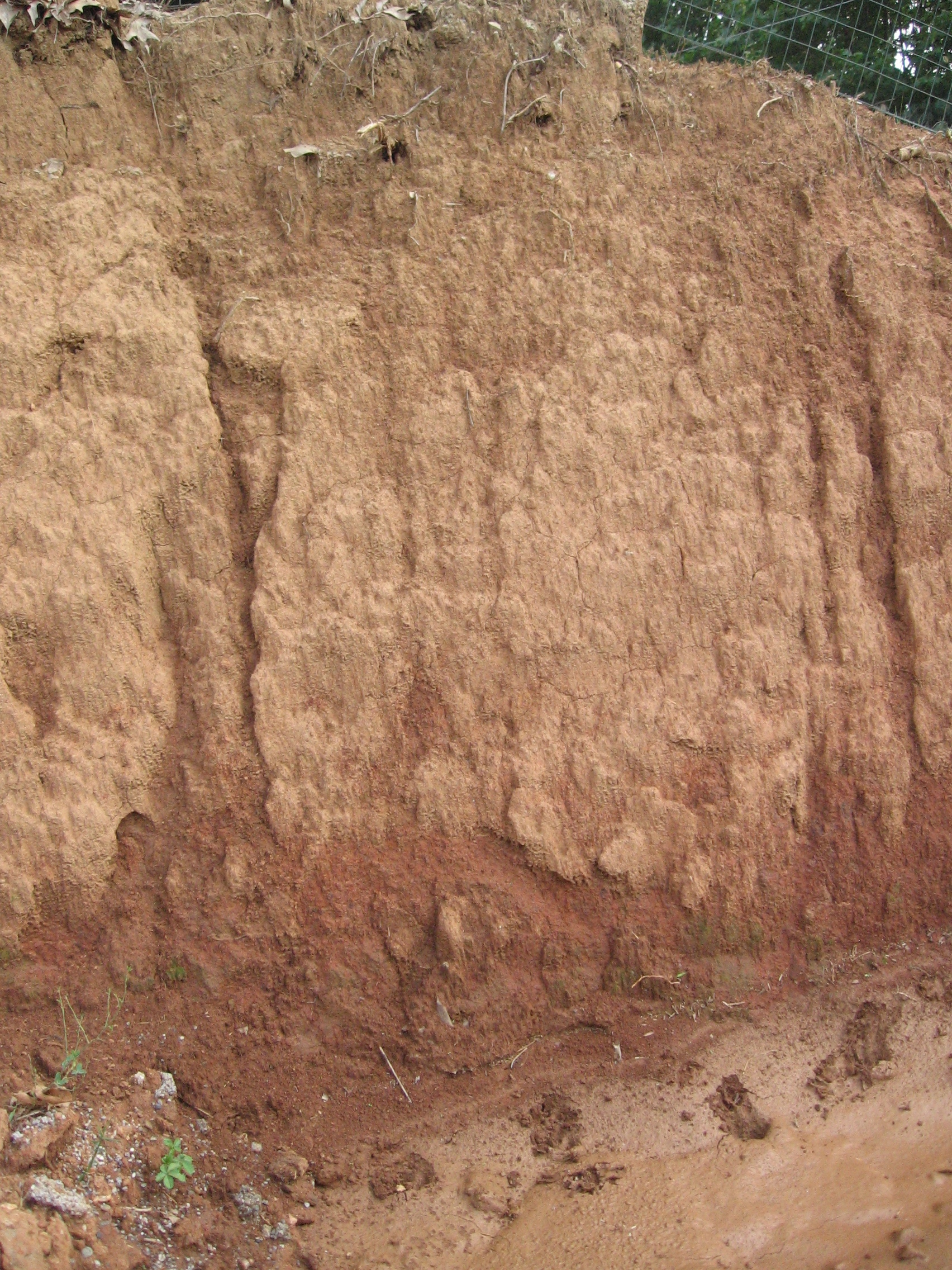 Reddish paleosoil, Lombardy.